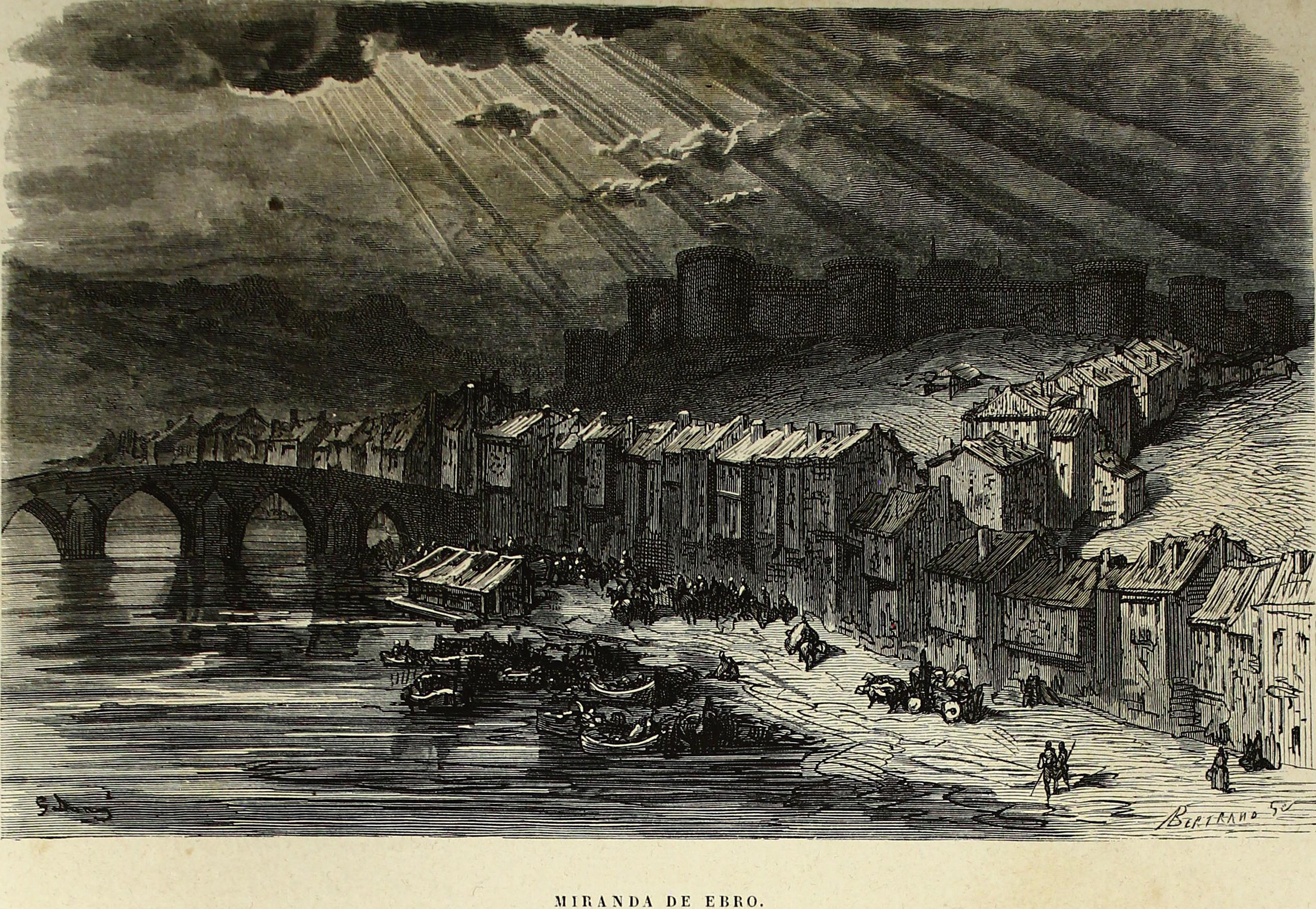 Autor: Davillier, Jean Charles, barón, 1823-1883 Descripción bibliográfica: L'Espagne / par Le Baron CH. Davillier ; ilustrée de 309 gravures dessinées su bois par Gustave Doré. - Paris : Librairie Hachette, 1874. - 799 p. : il. Materia: España- Geografía Materia: España- Usos y costumbres Ilustrador: Doré, Gustave, 1832-1883 Editor: Libreria Hachette Lugar de impresión: Francia, París Localización: Libro completo